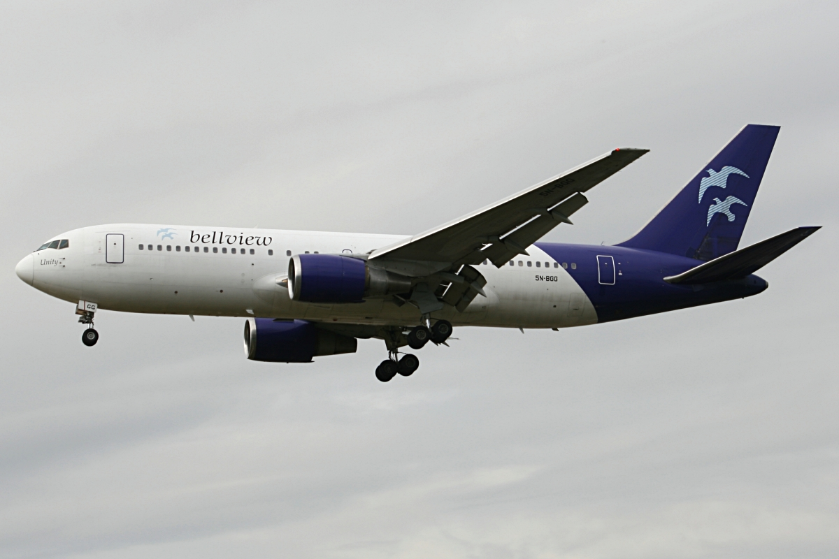 Bellview Airlines Boeing 767-241ER 5N-BGG